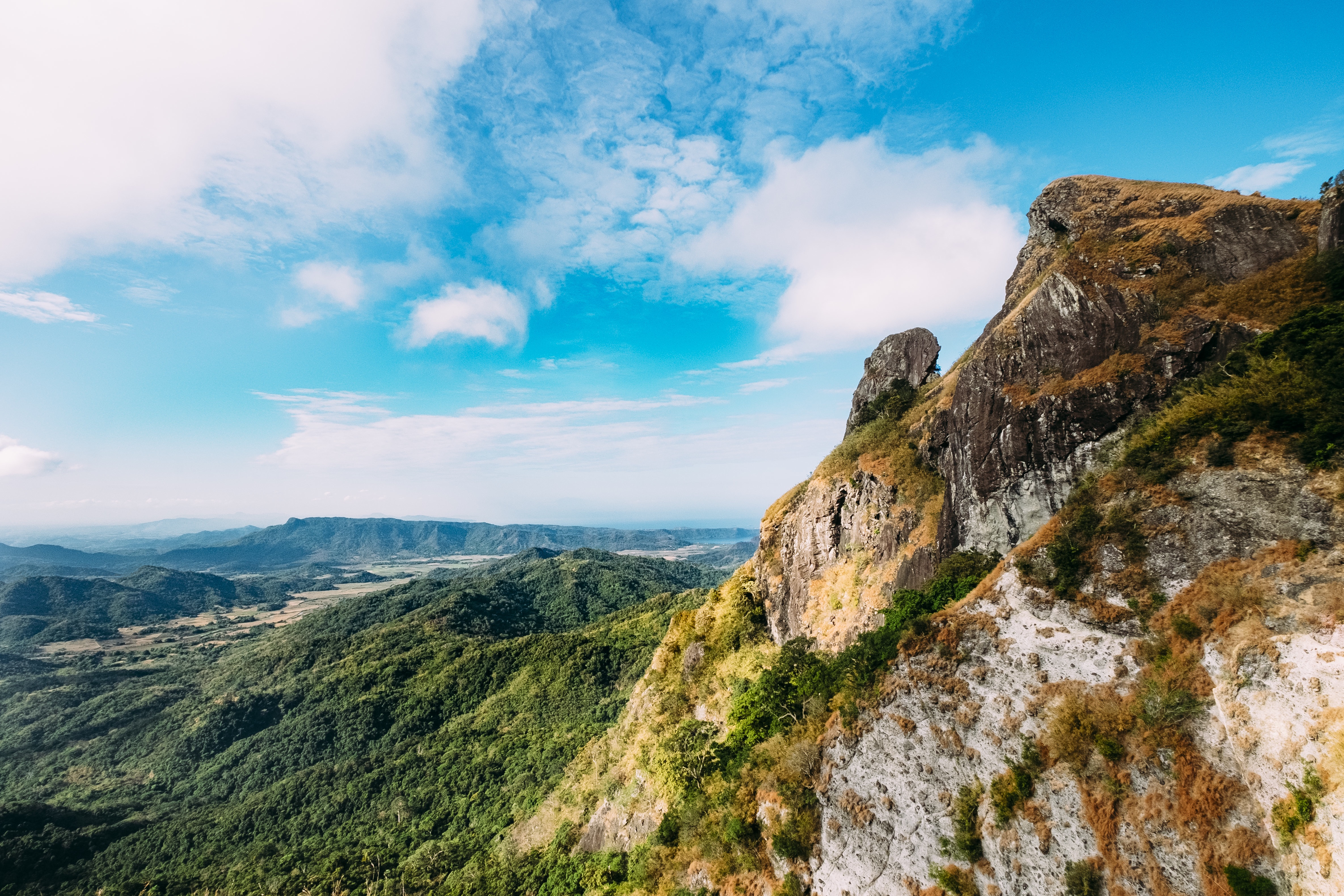 Monte Pico de Loro, Filipinas